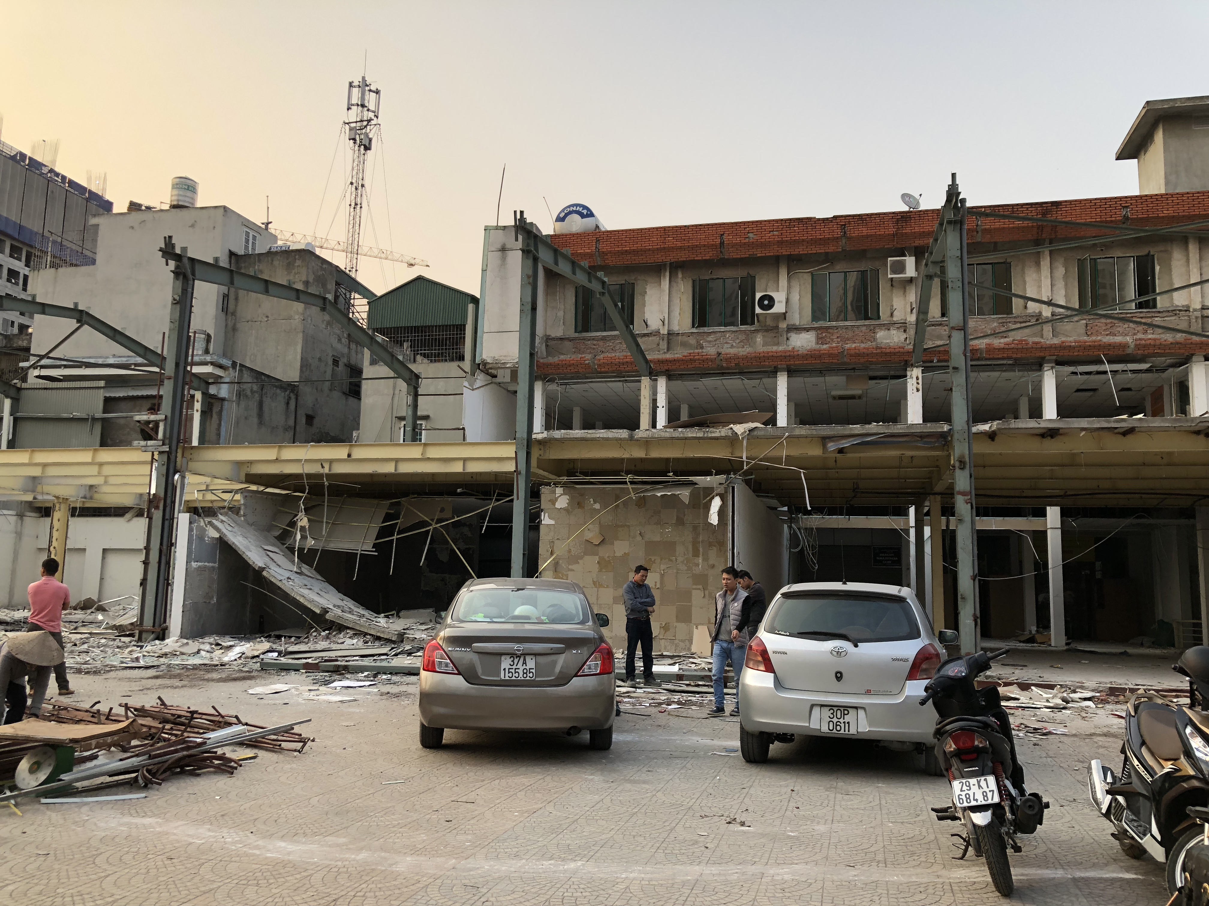 Hà Nội tháo dỡ nhà trên phố Minh Khai, đối diện Times City